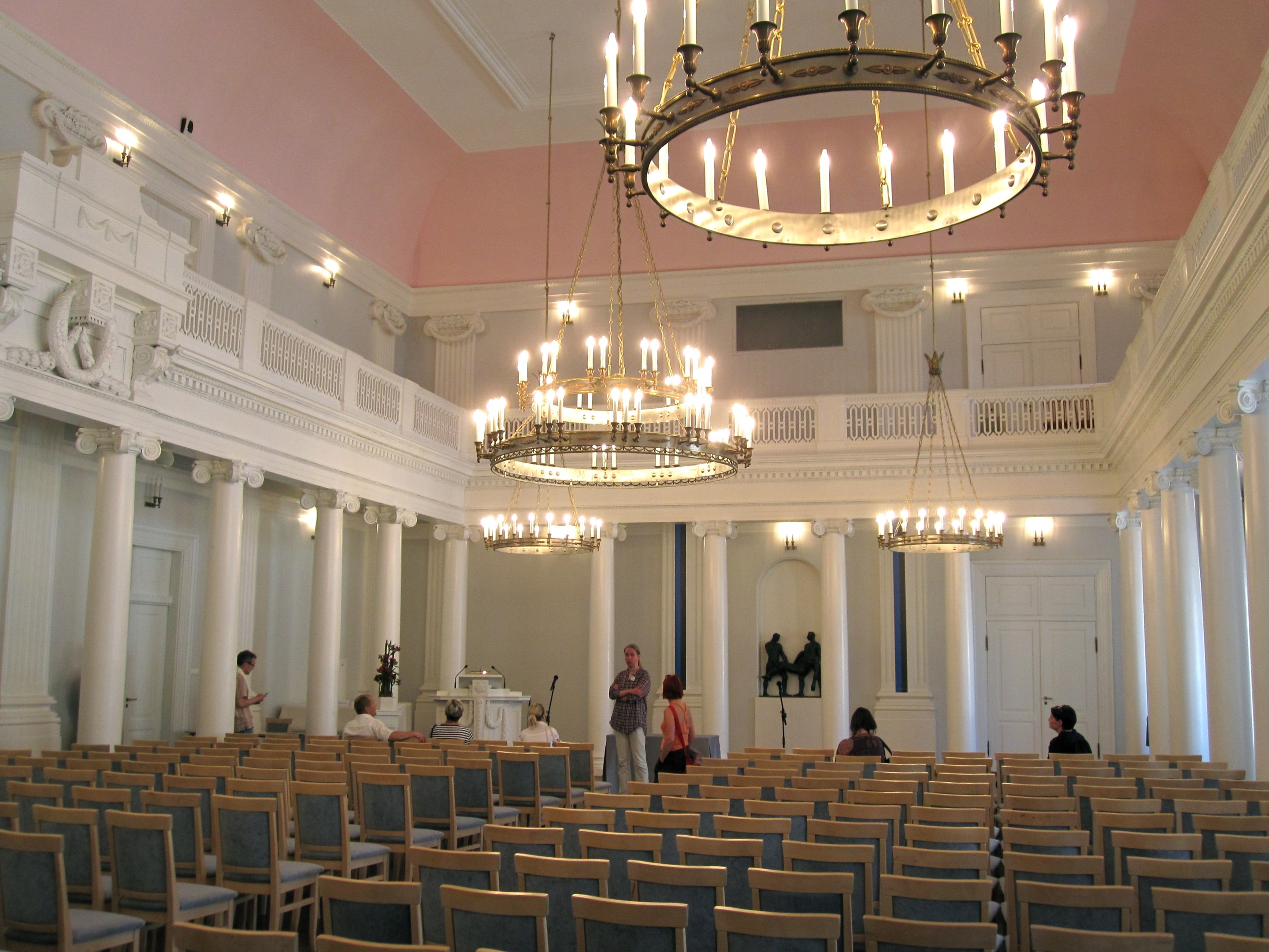 Tartu ülikooli peahoone aula